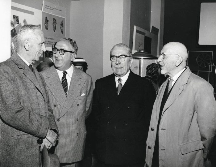 Il sindaco di Milano Virgilio Ferrari, accompagnato dal primo presidente della Corte d'Appello Manlio Borrelli, visita la Fiera